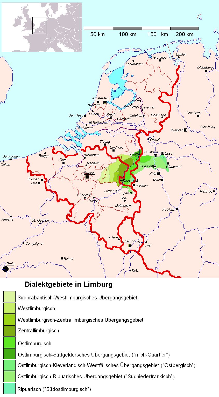 Einteilungskarte der limburgischen Dialekte